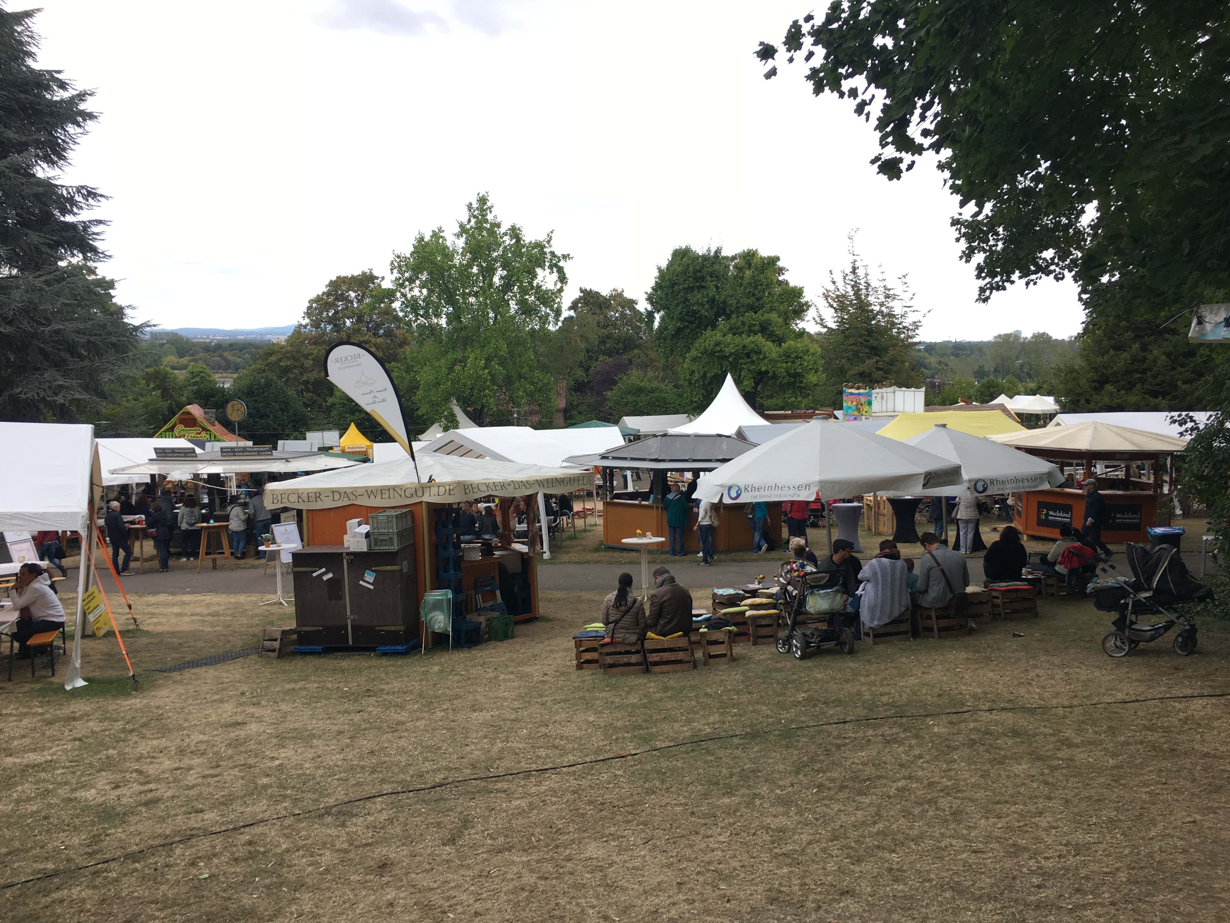 Mainzer Weinfest